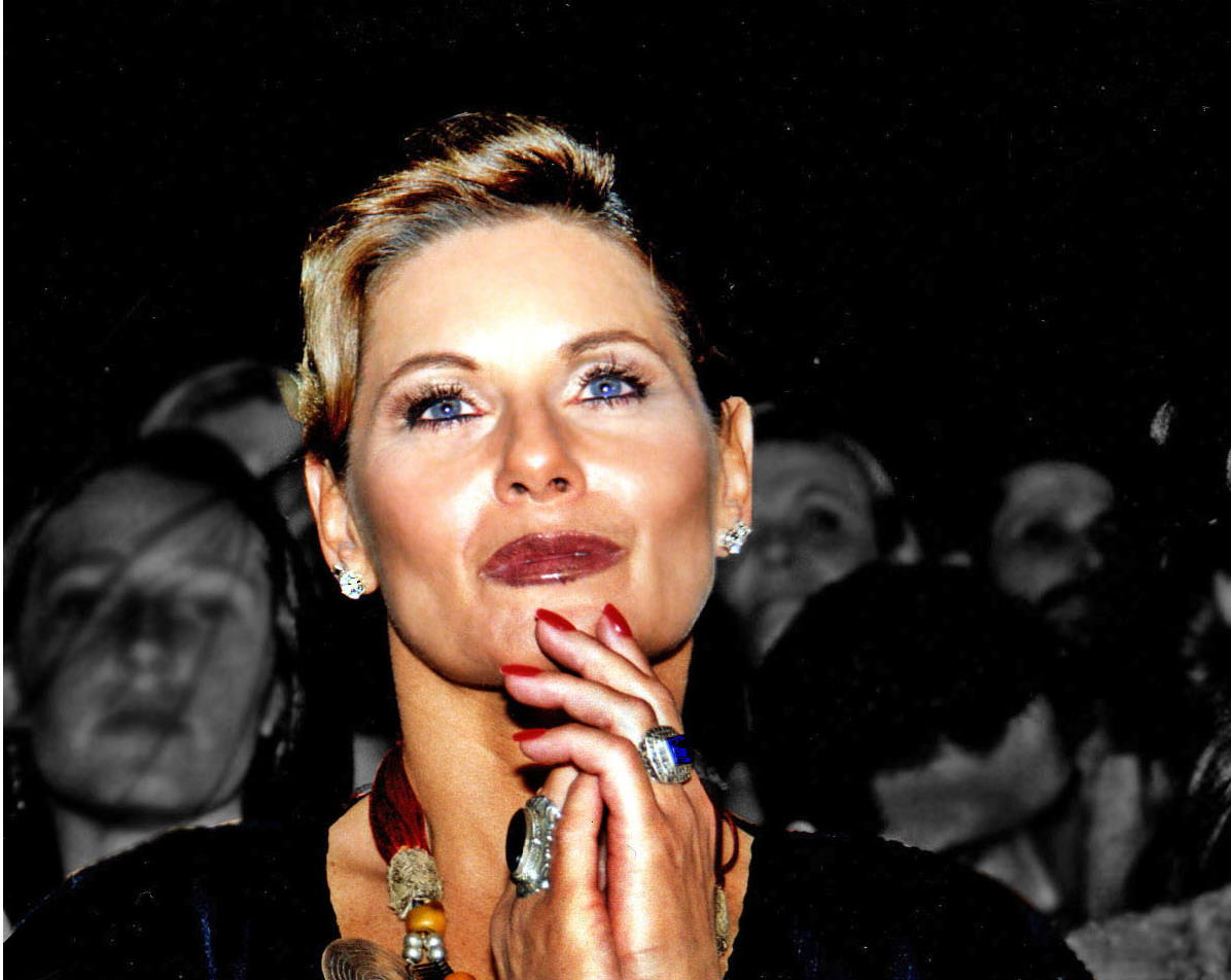 Brazilian actress Vera Fischer.